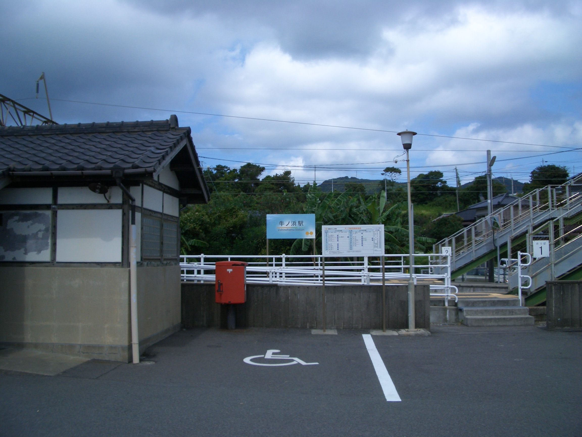 肥薩おれんじ鉄道牛ノ浜駅